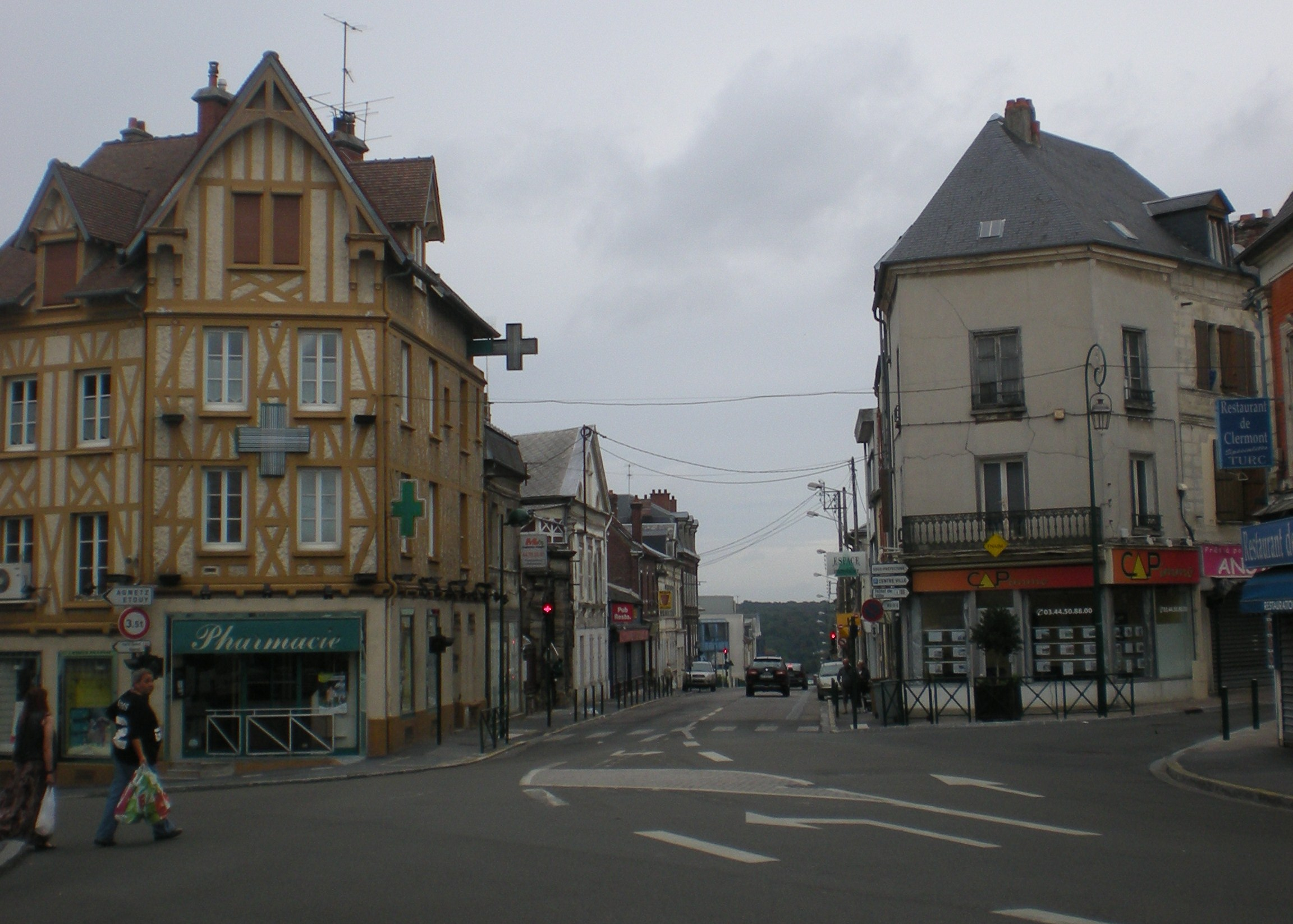 Clermont (Oise), la place descuignères en 2010